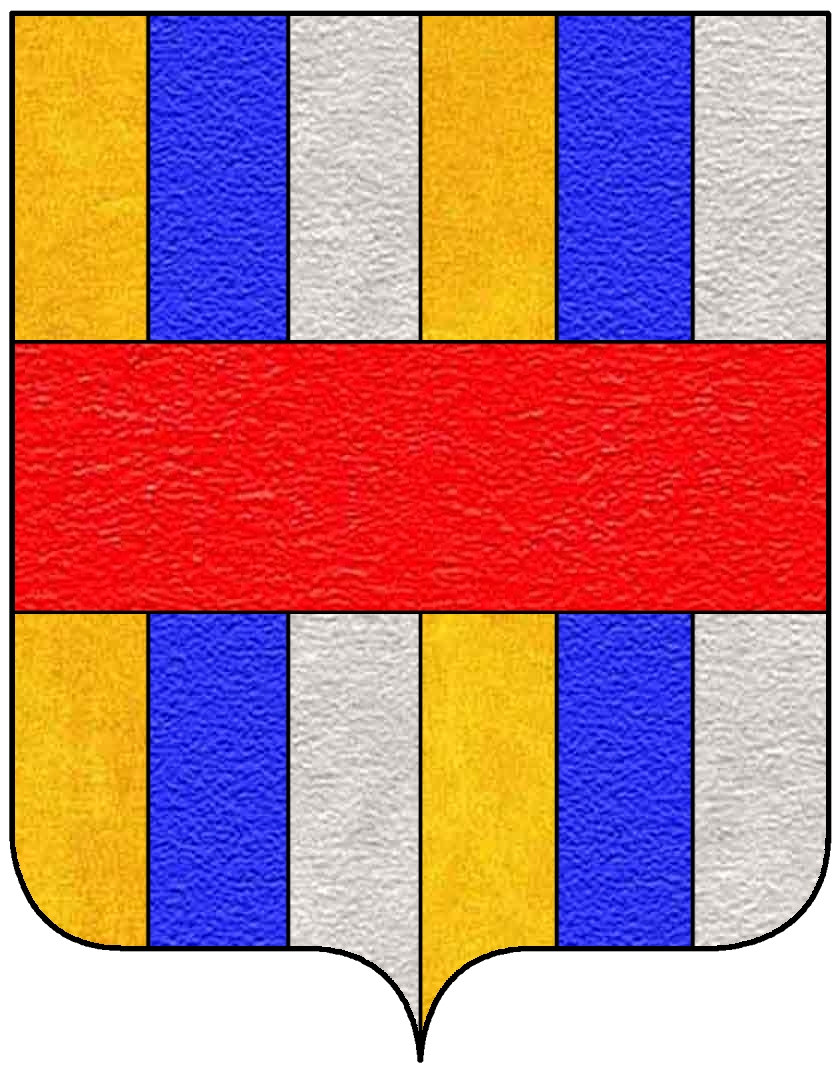 Stemma della famiglia Trevisani